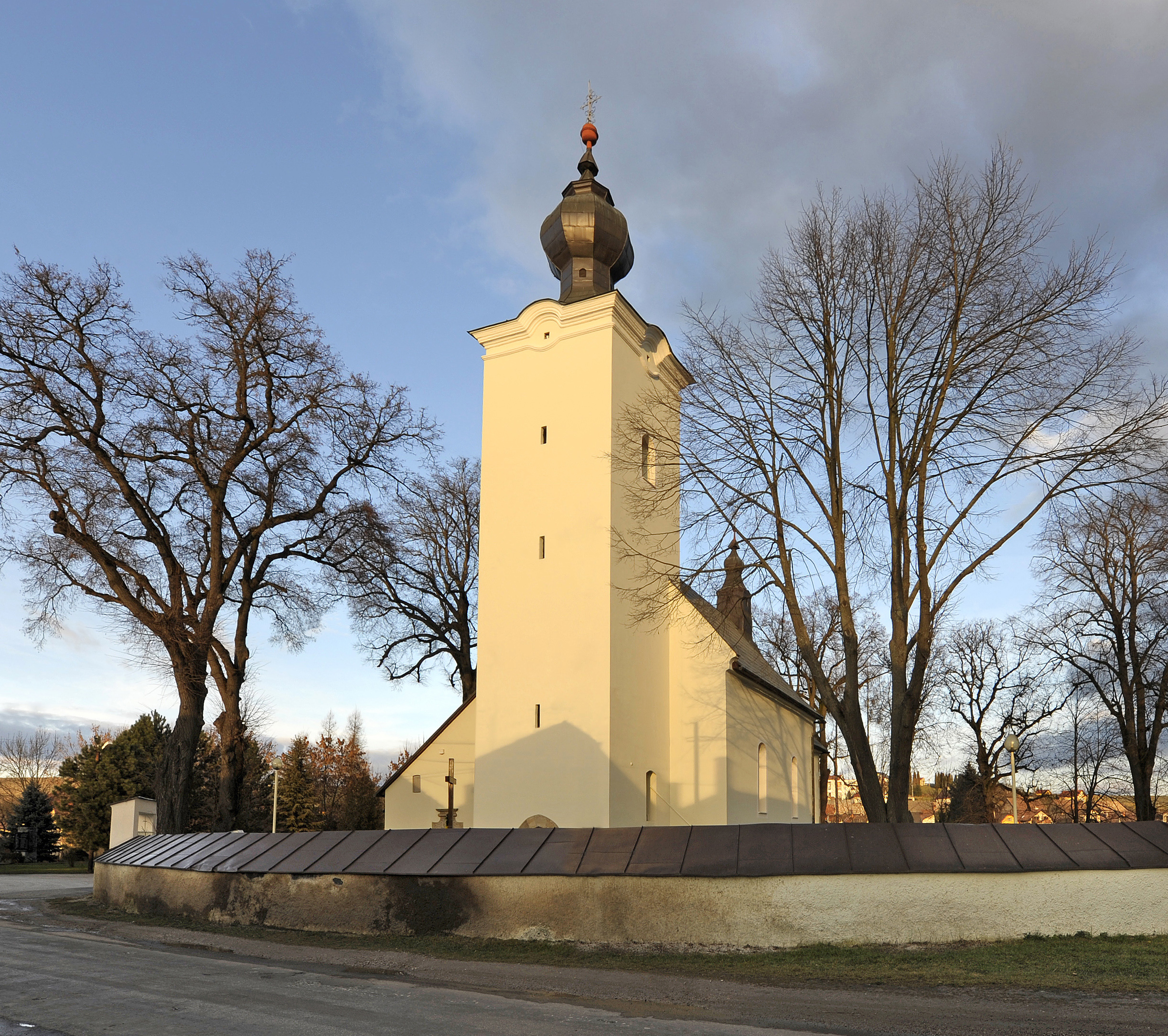 Farský kostol sv. Mikuláša